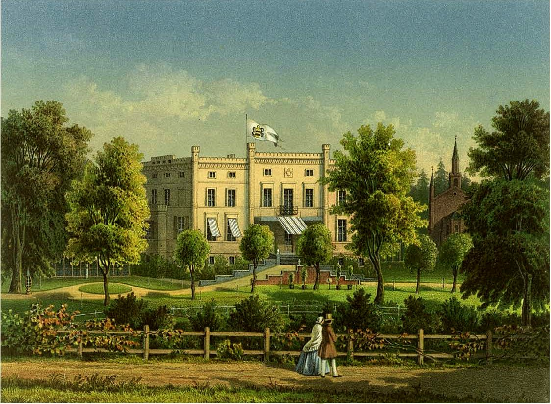 Schloss Tantow, Kreis Randow, Provinz Pommern